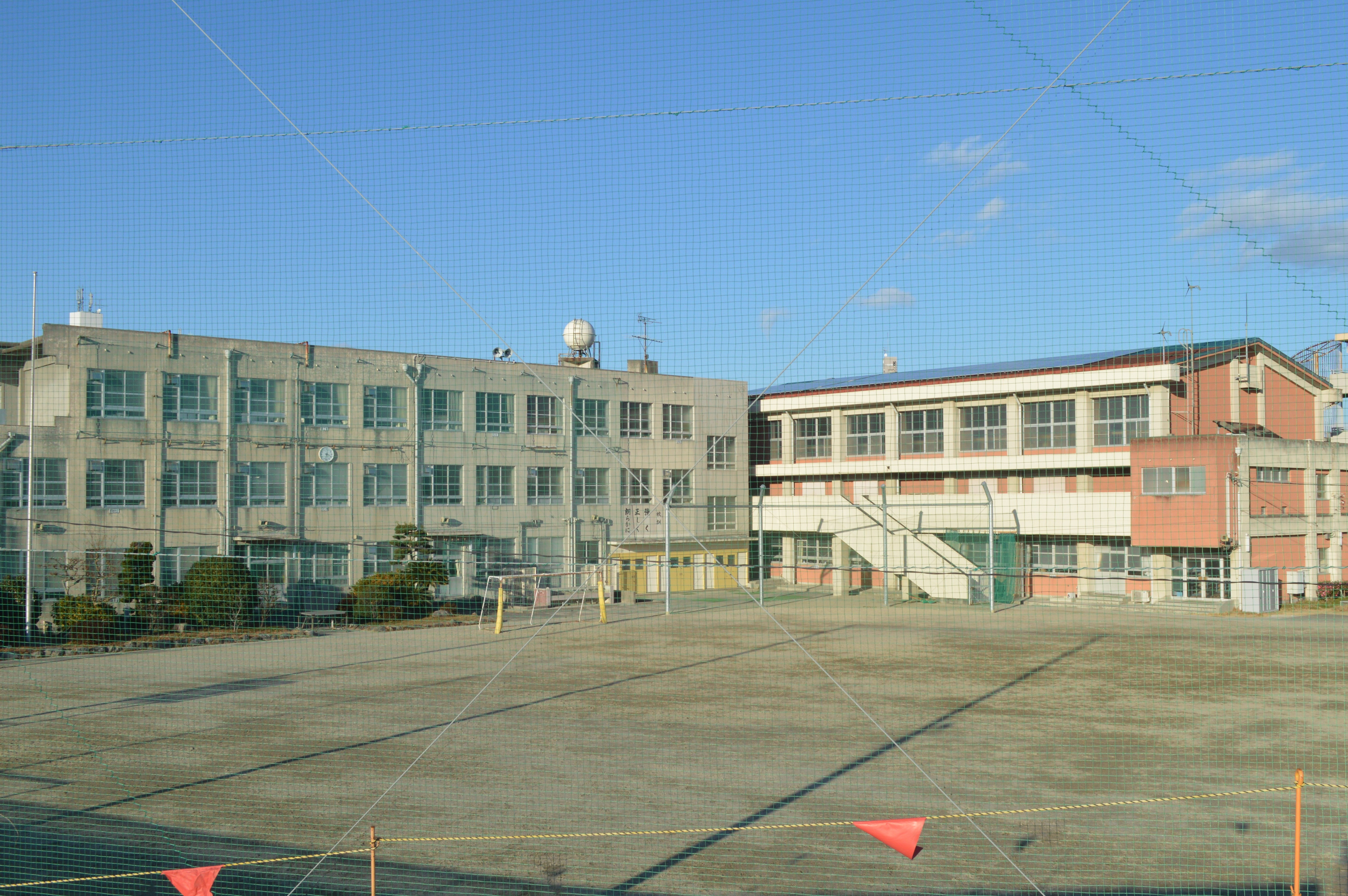 愛知県名古屋市中川区下之一色町にある名古屋市立正色小学校。